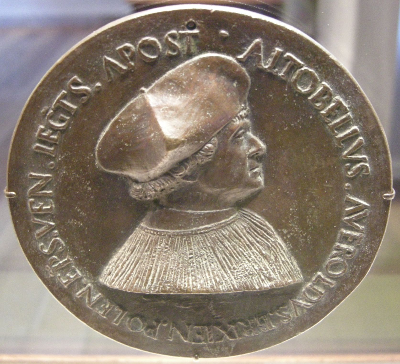 Medaglia di Altobello Averoldi da Brescia, 1517-21 recto